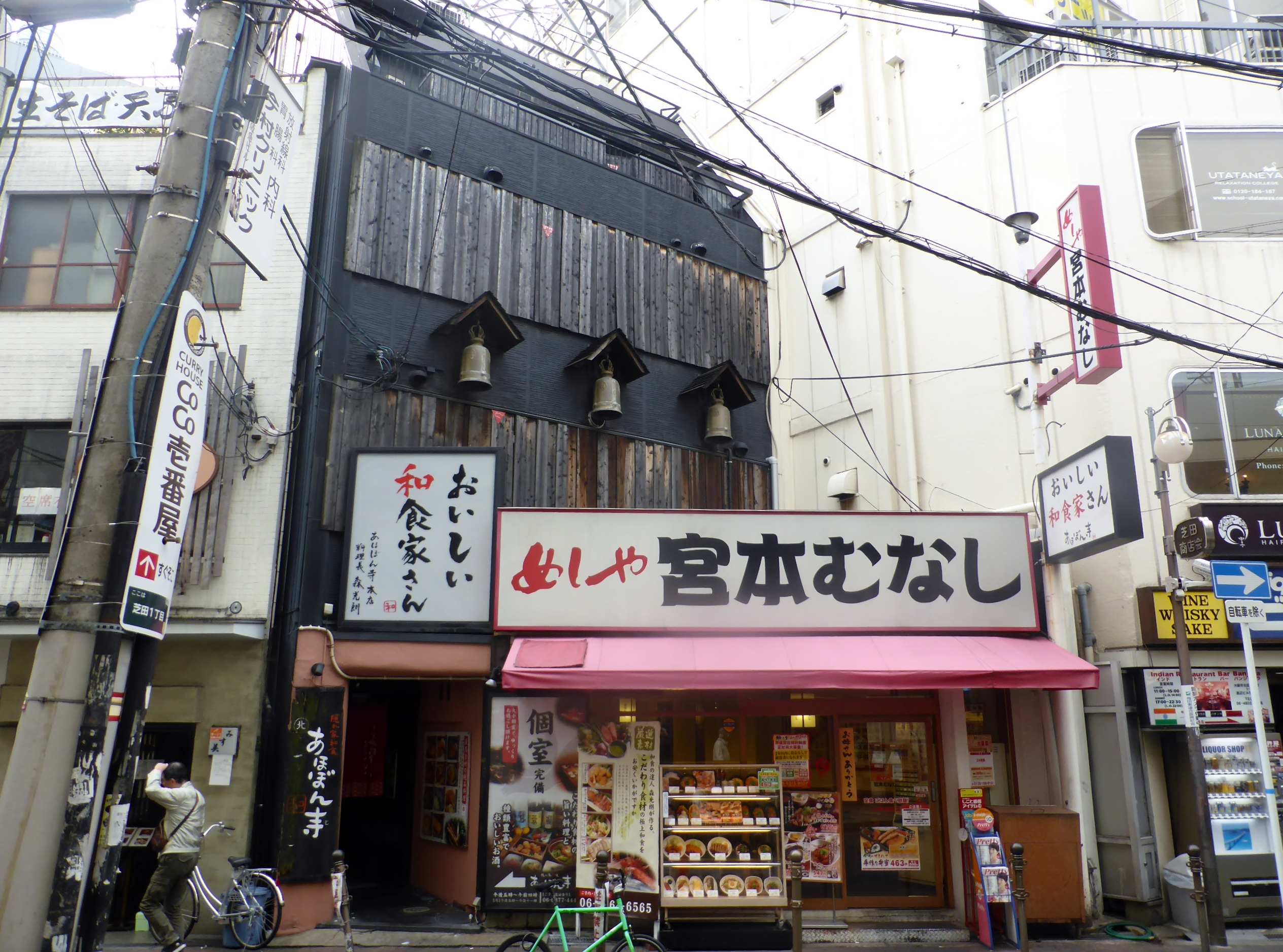 宮本むなし芝田店及び北あほぼん寺を撮影。